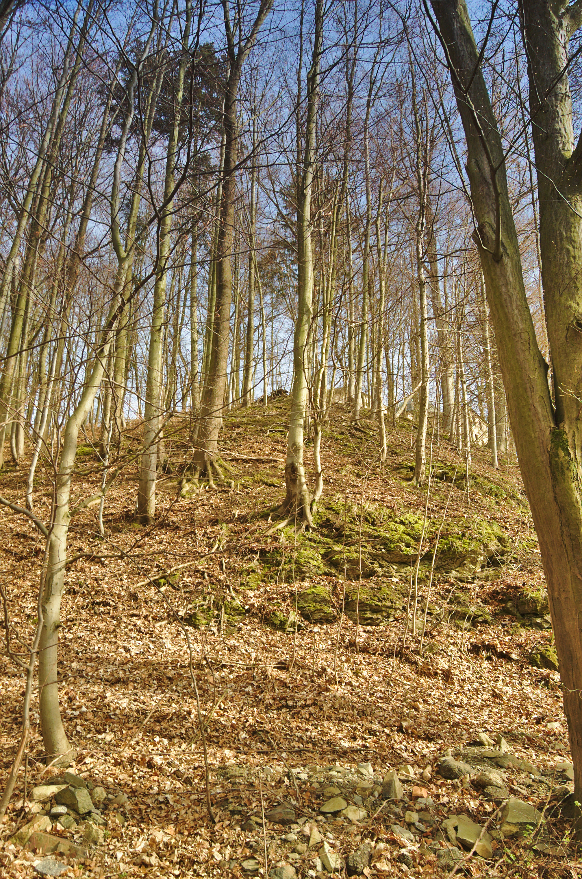 Přírodní památka Kunštátská obora, okres Blansko